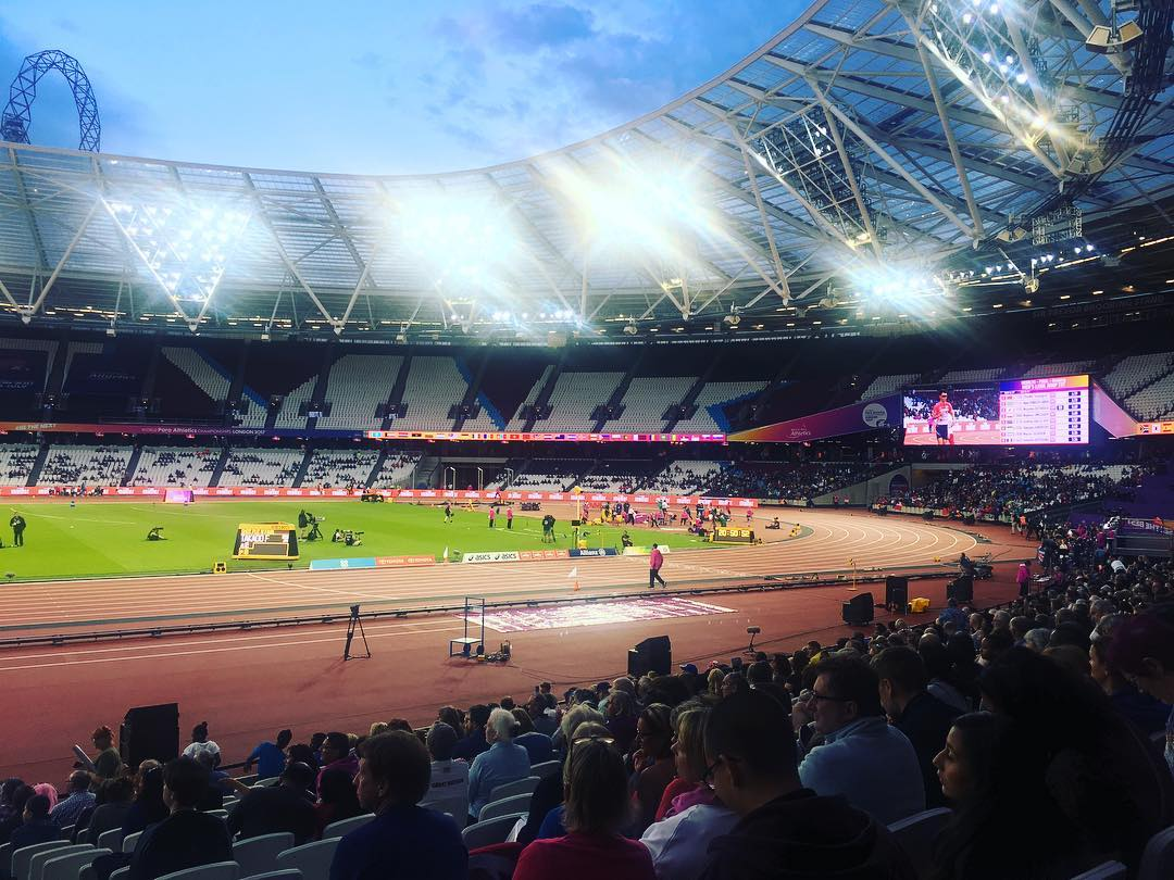 View on Instagram ift.tt/2vsTbMx